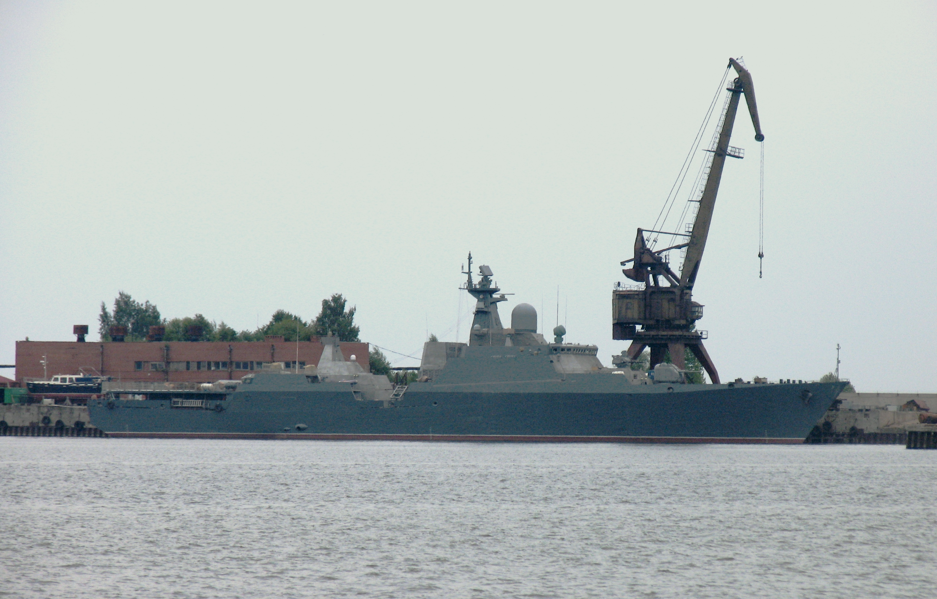 Сторожевой корабль проекта 11661 (Гепард 3.9) для ВМС Вьетнама (зав. № 954) у стенки Кронштадского морского ордена Ленина завода (КМОЛЗ).